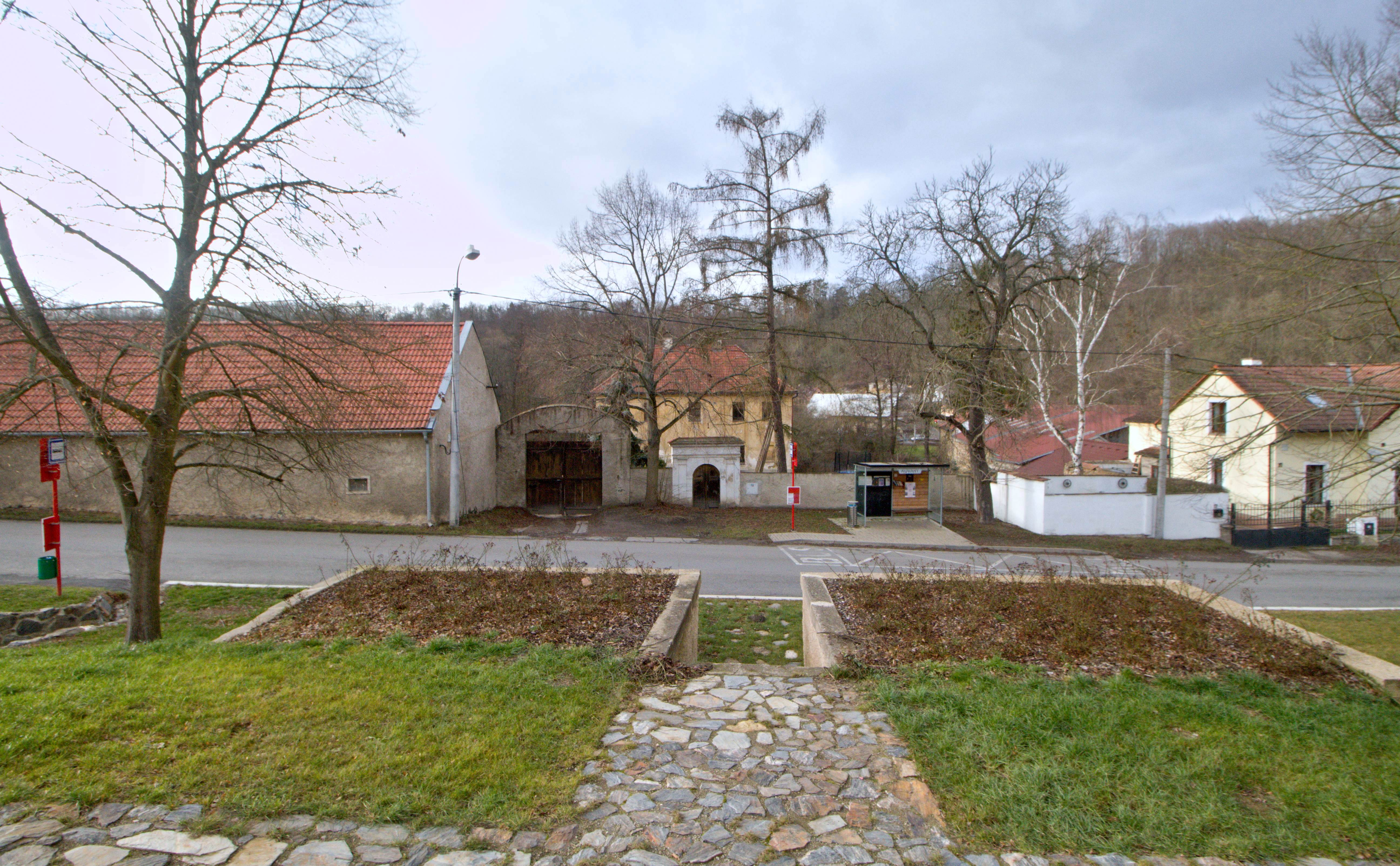 Kováry, okres Kladno